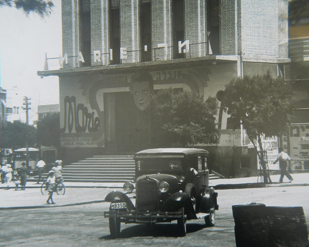 קולנוע מוגרבי בתמונה שצילם רודי ויסנשטיין בסביבות 1940 רישיון נוצר על ידי משתמש:י.ש.